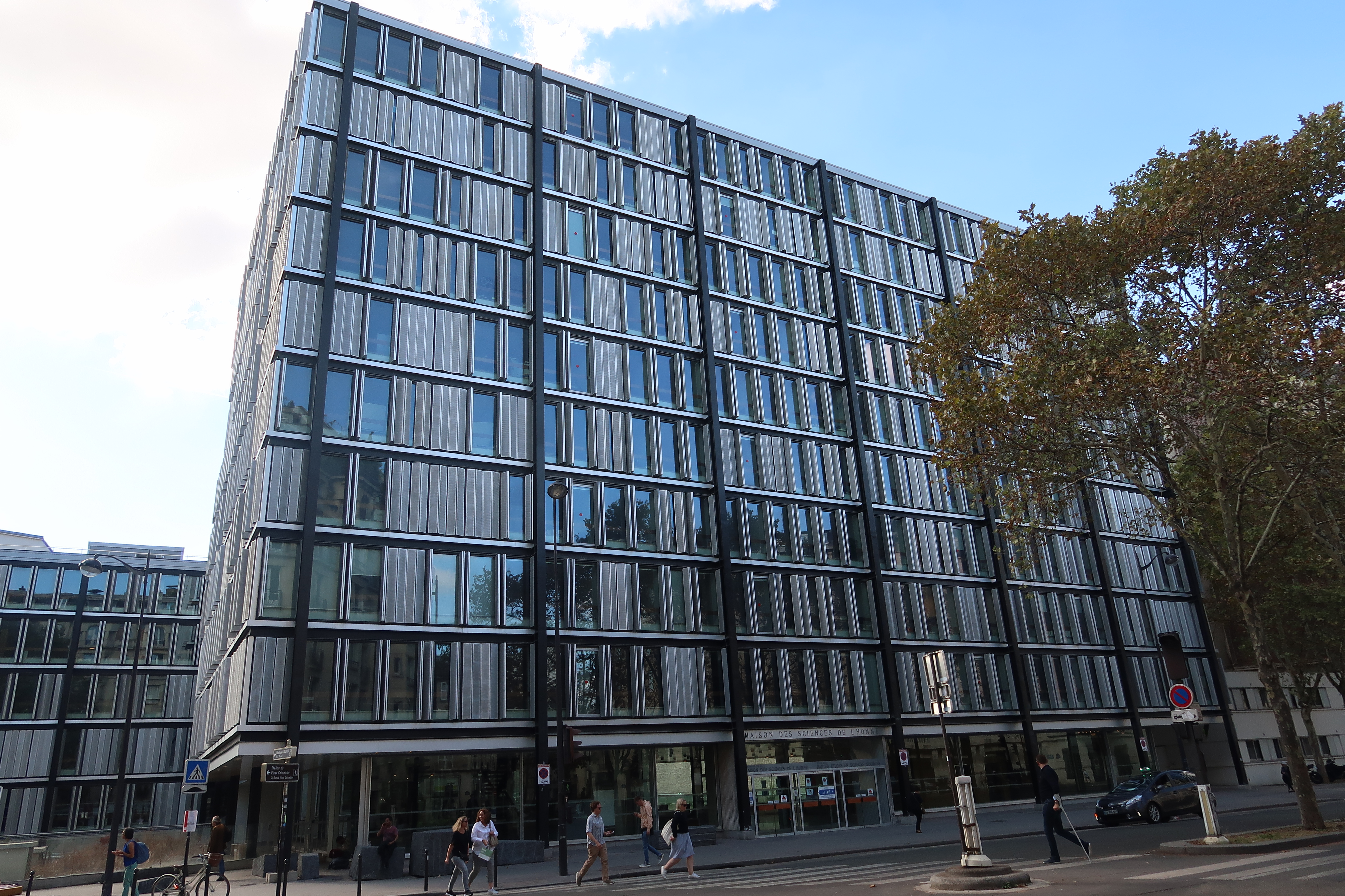 Maison des sciences de l'homme, 54 boulevard Raspail (Paris 6e).